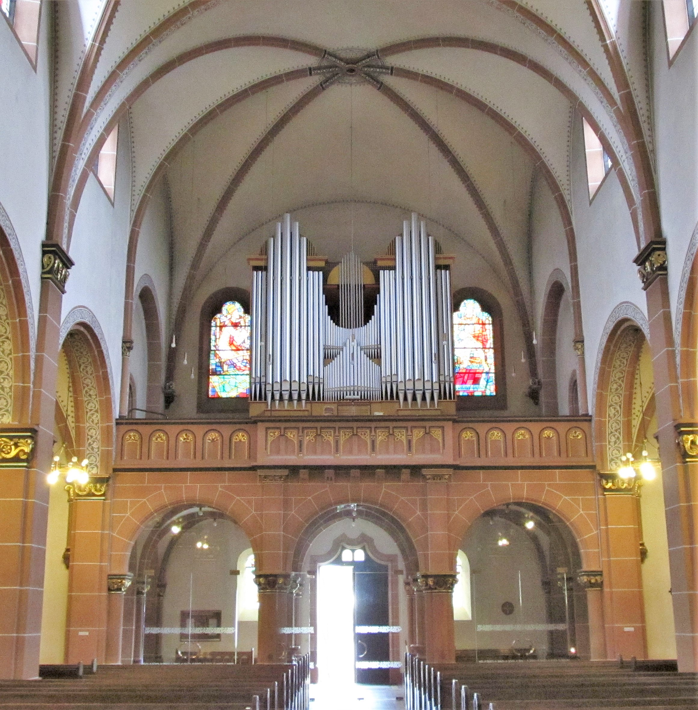 Blick ins Innere der katholischen Pfarrkirche St. Sebastian in Püttlingen, Saarland